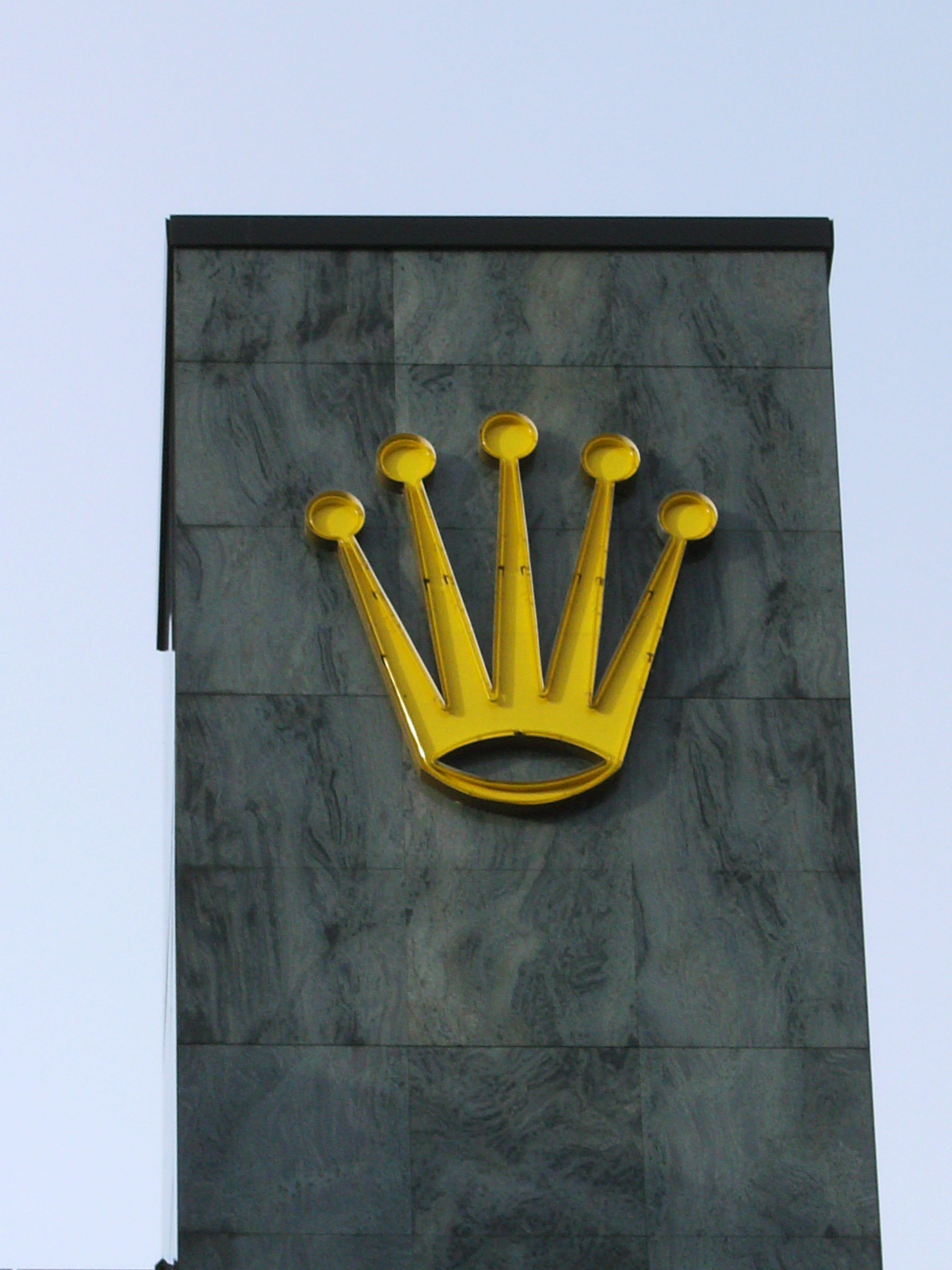 Bâtiment de la société Rolex à Bienne (canton de Berne, Suisse)